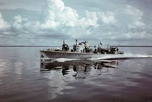 Vartiomoottorivene 9 (VMV 9) Somerin taistelun jälkeen, mahdollinen kuvausajankohta.